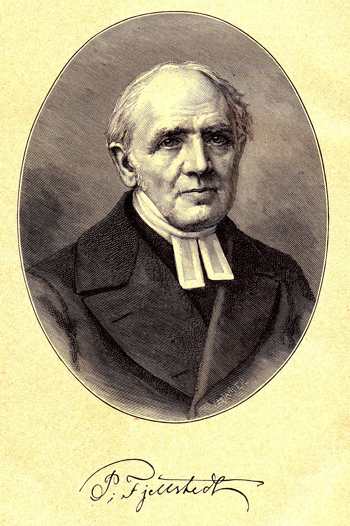 Peter Fjellstedt (1802-1881), präst, missionär, predikant och författare